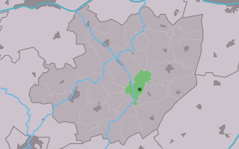 Kaartsje fan himrik fan Britswert